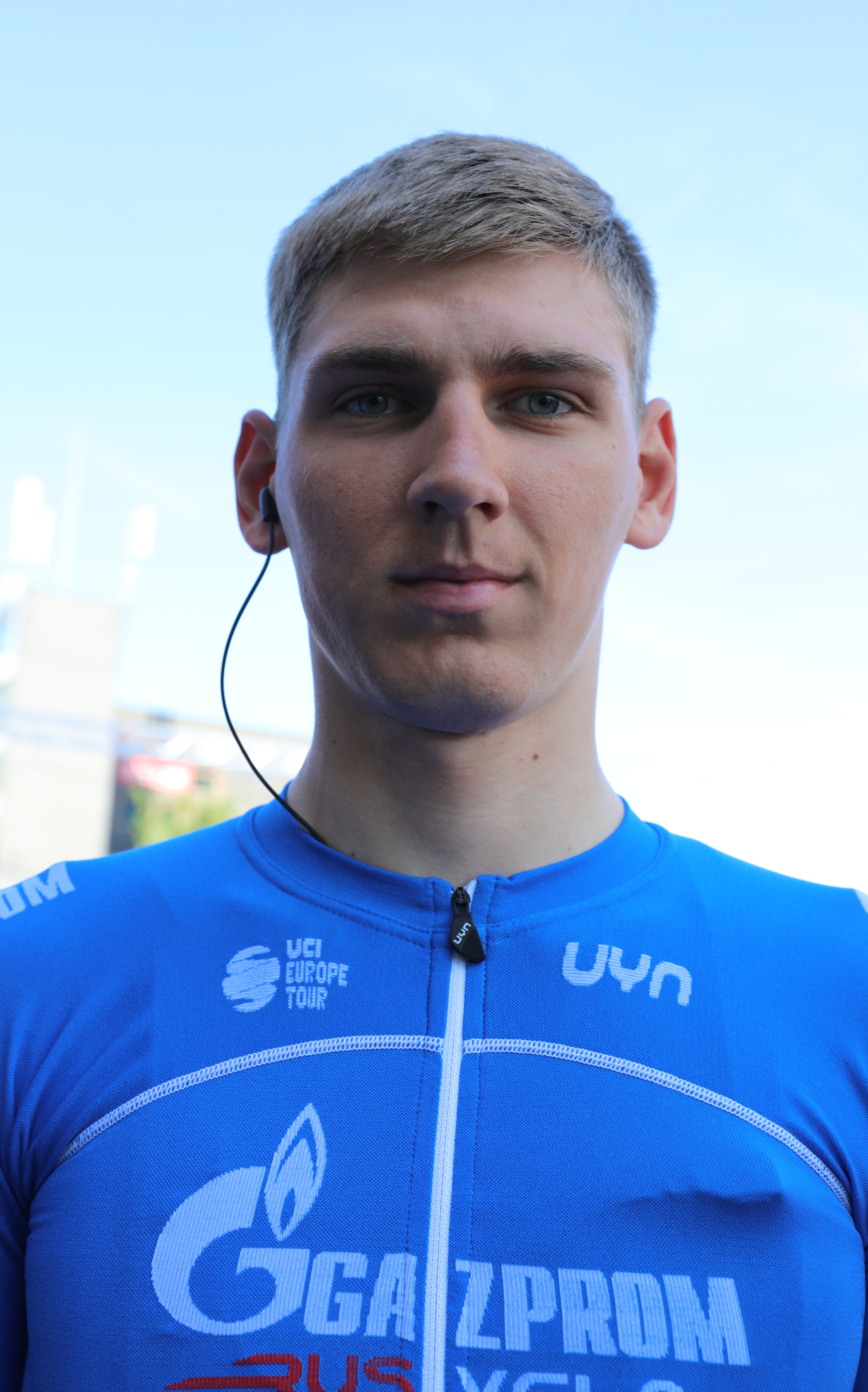 Vladislav Kulikov, russischer Radrennfahrer